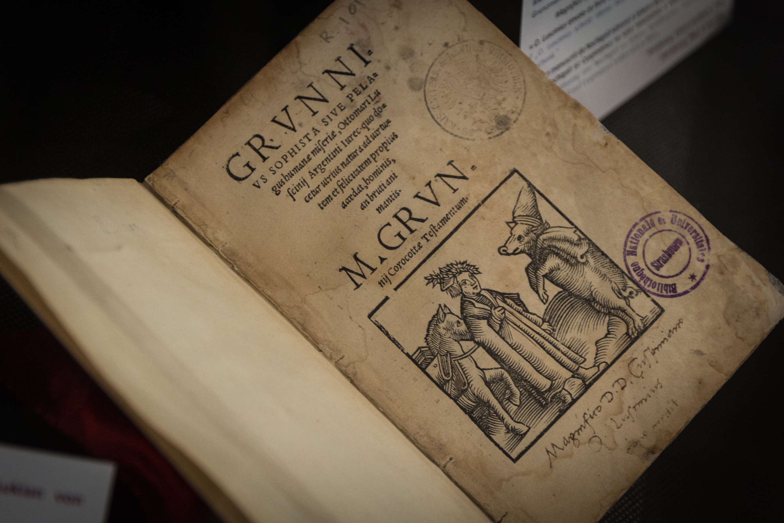 Grunnius le sophiste, ou l’océan de l’humaine misère. Imprimé par J.Knobloch, Strasbourg 1522. Coll. Bibliothèque nationale et universitaire de Strasbourg. R.101.203